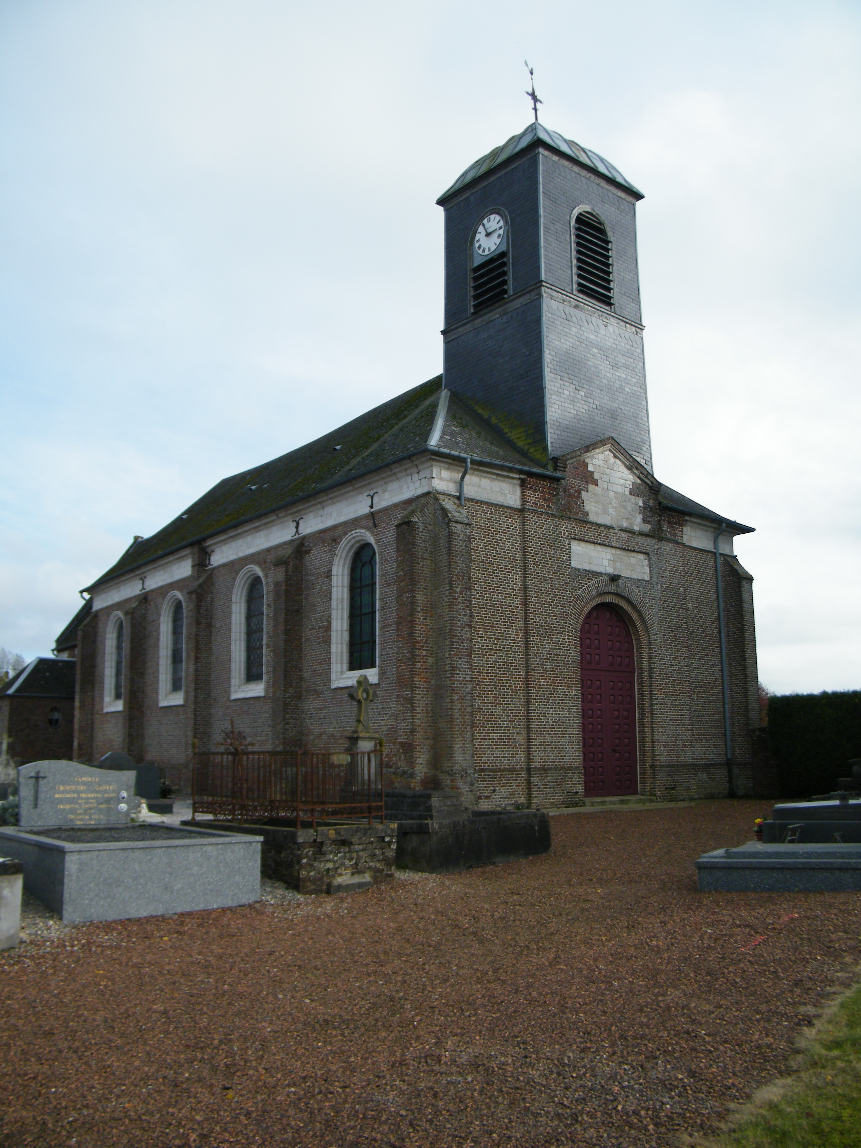 Domvast, Somme, église (2)